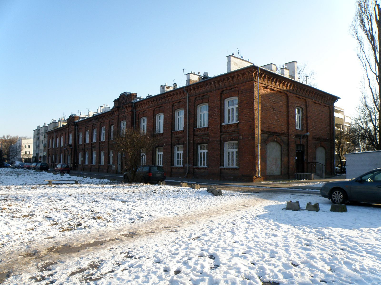 Budynek koszar ul. Szwoleżerów 7a, Warszawa. Jak głosi miejscowa legenda, budynek ma tak szerokie schody na piętro, że można po nich wjechać konno.